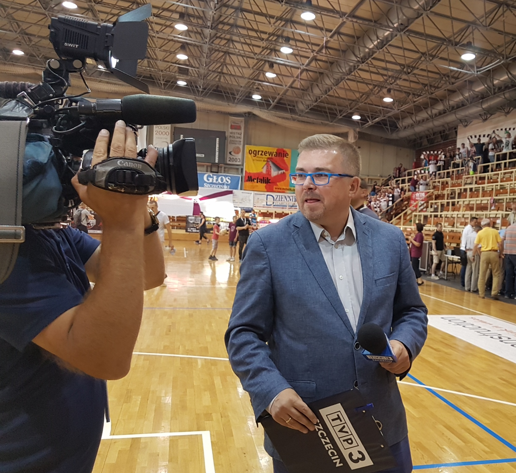 Jarosław Marendziak, TVP3